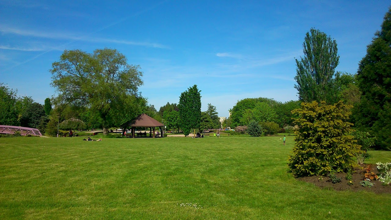 Vue panoramique d'une partie du parc Richard-Pouille